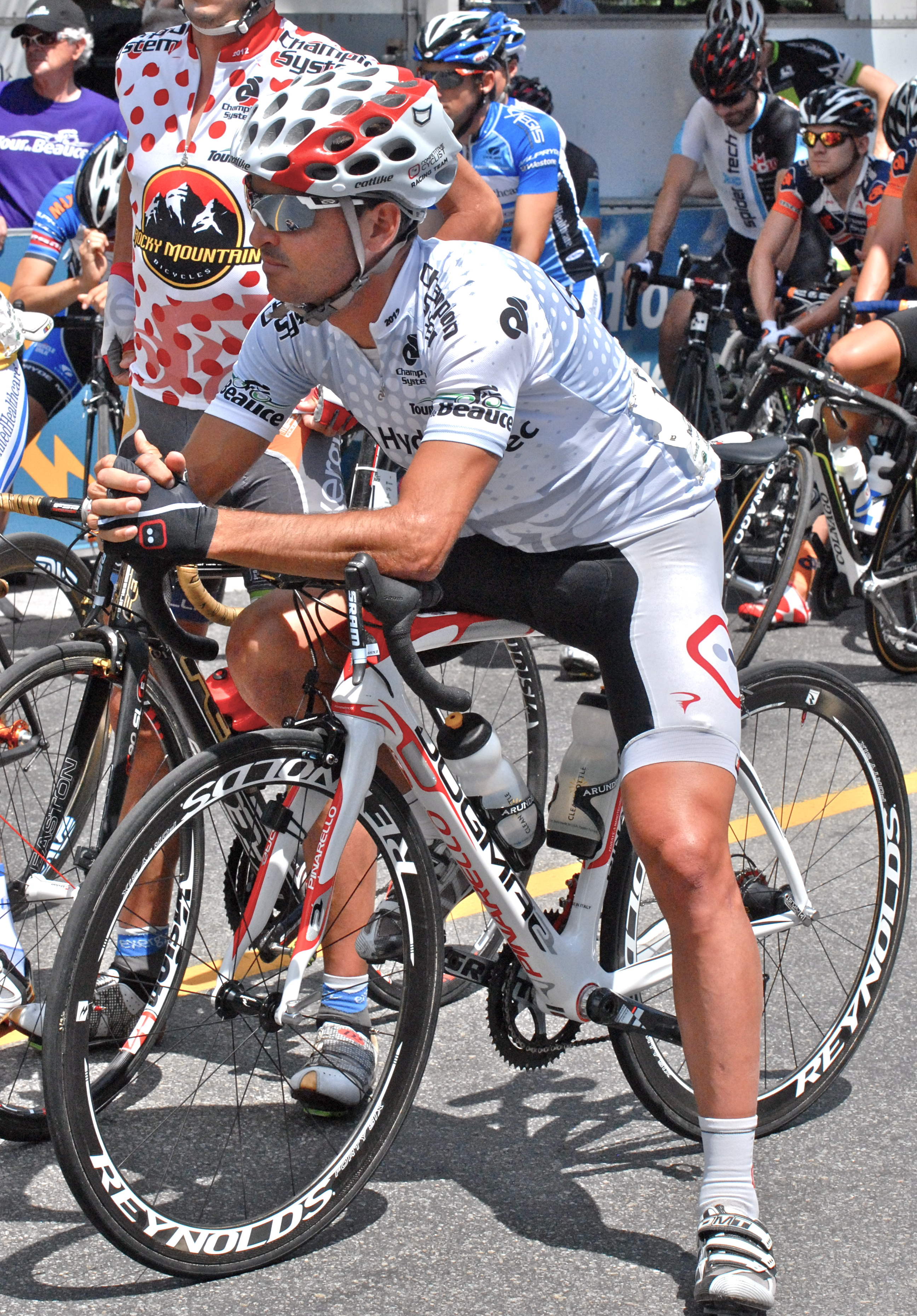 Francisco Mancebo, attendant le signal du départ de la cinquième et avant-dernière étape du Tour de Beauce 2012, disputée le 16 juin 2012 à Québec. Il porte le maillot blanc, attribué au meneur du classement aux points.